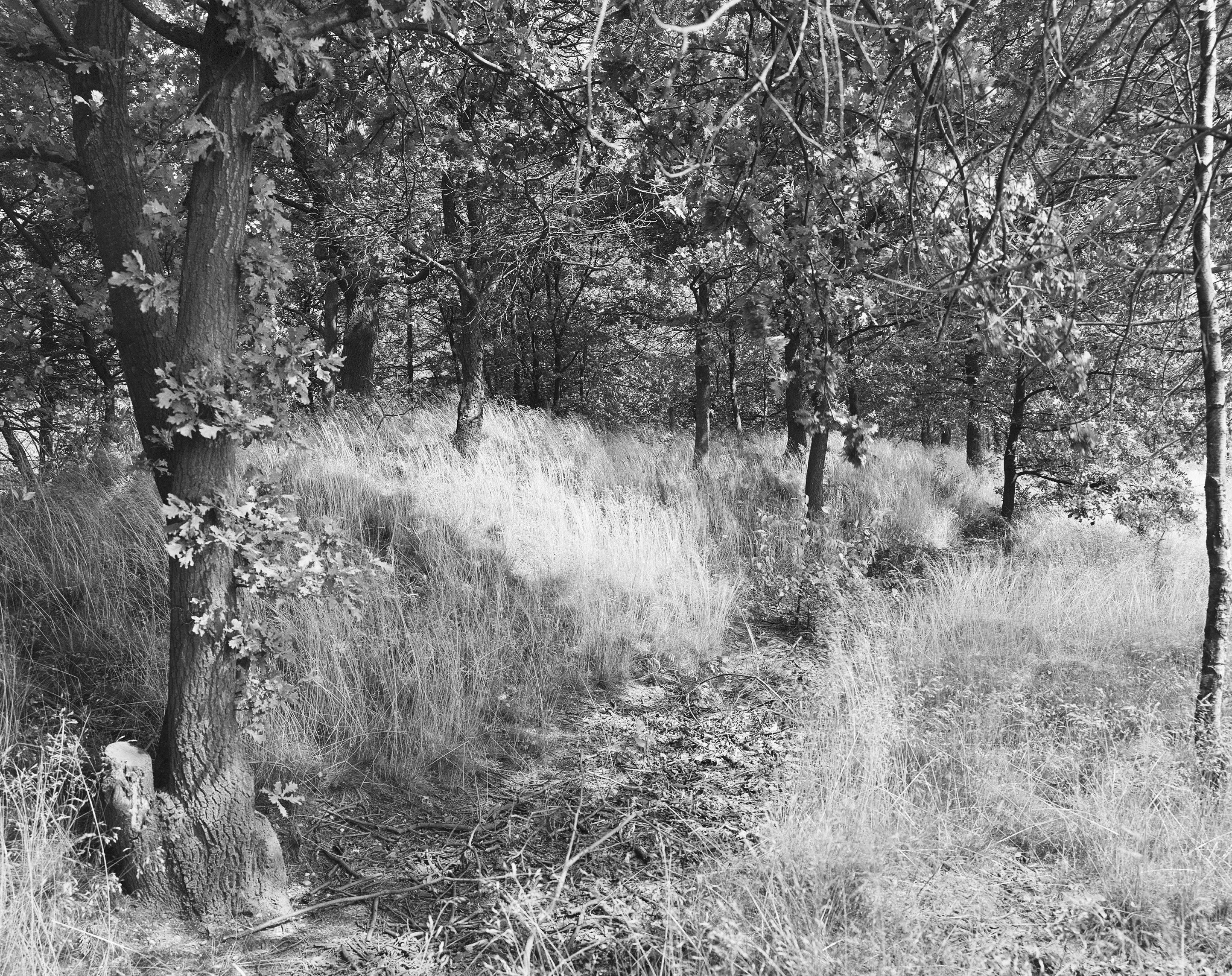 Vestingwalmuur: landweer op kadastrale percelen F.1758 en 1759 This is a possible Rijksmonument: Find the monument in the Monuments database: in Venlo All Rijksmonumenten in Venlo Is this a Rijksmonument? Yes No More information about this project and help. More images to work at in Category:Possible Rijksmonumenten.